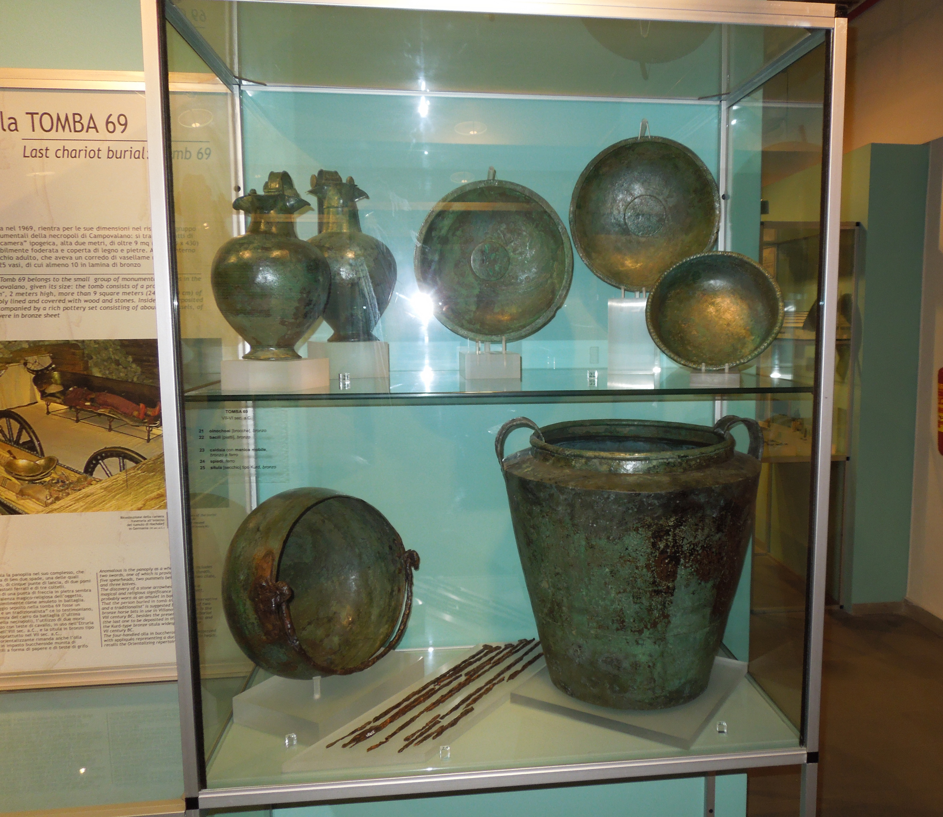 Teca contenente reperti provenienti dalla tomba n. 69 della Necropoli di Campovalano in provincia di Teramo.